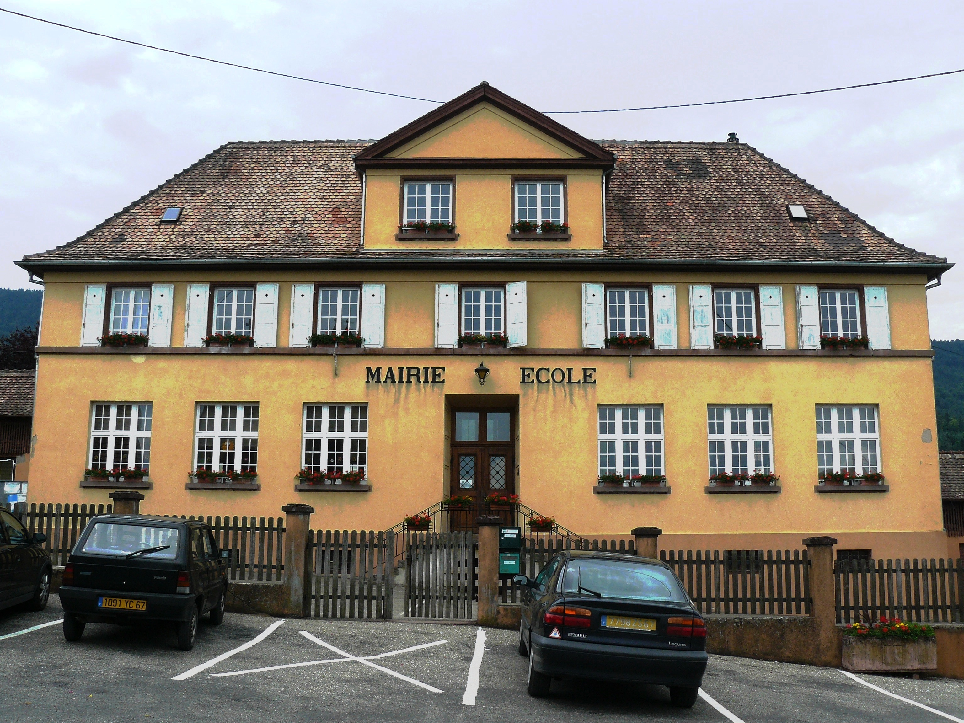 Mairie de Dieffenbach-au-Val